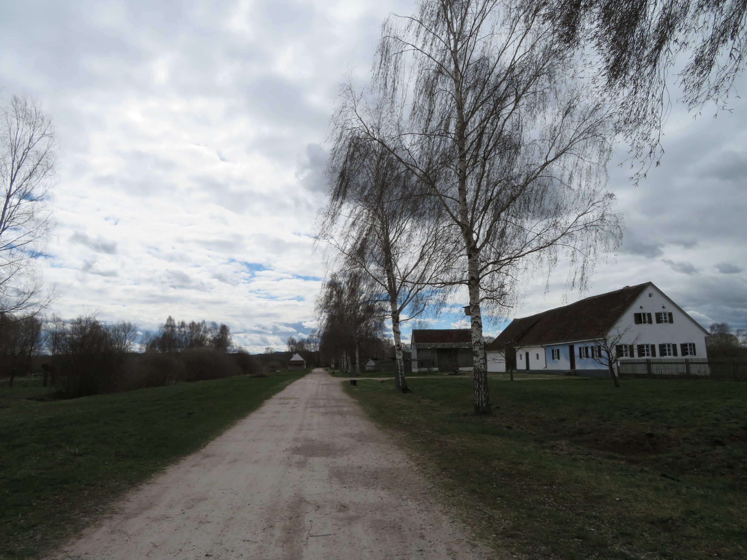 Haus im Moos, Blick zu den translozierten Gebäuden an der Museumsstraße